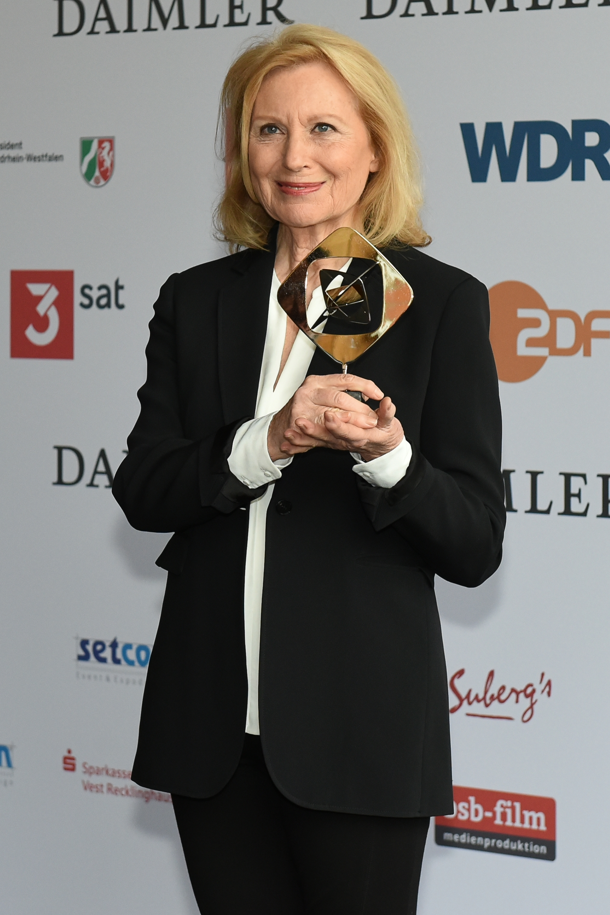 Verleihung des Grimme-Preises 2019.